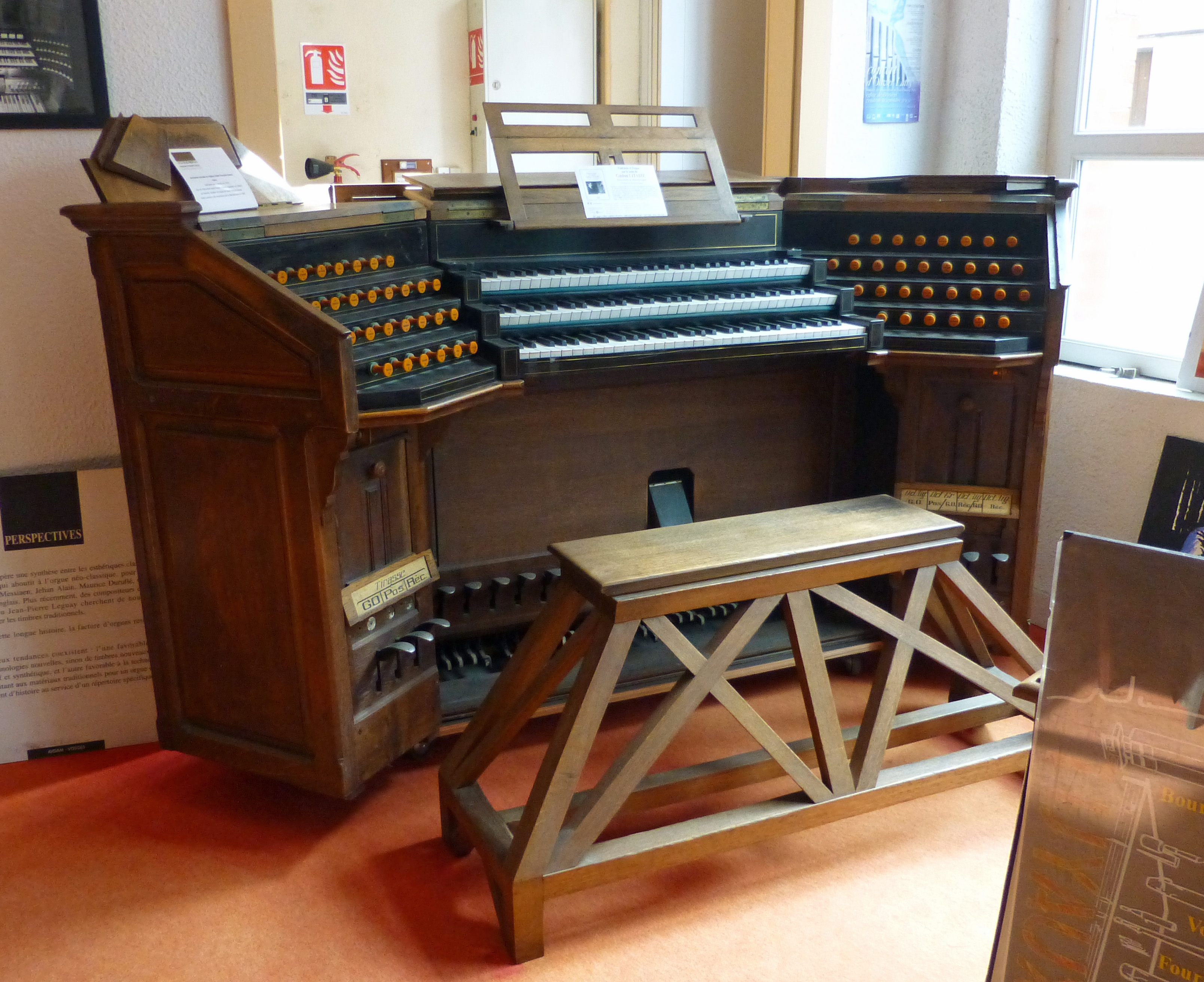 Instruments à la Manufacture vosgienne de grandes orgues (Rambervillers) : ancienne console de l'église Saint-François-Xavier (Paris), fabriquée par J. Fermis en 1878. Sur cet instrument jouait Gaston Litaize, né à Ménil-sur-Belvitte, titulaire de l'orgue de Saint-François-Xavier. Cette console a été remplacée par la Manufacture en 1992.